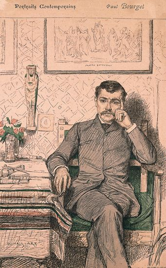 gravure 1889